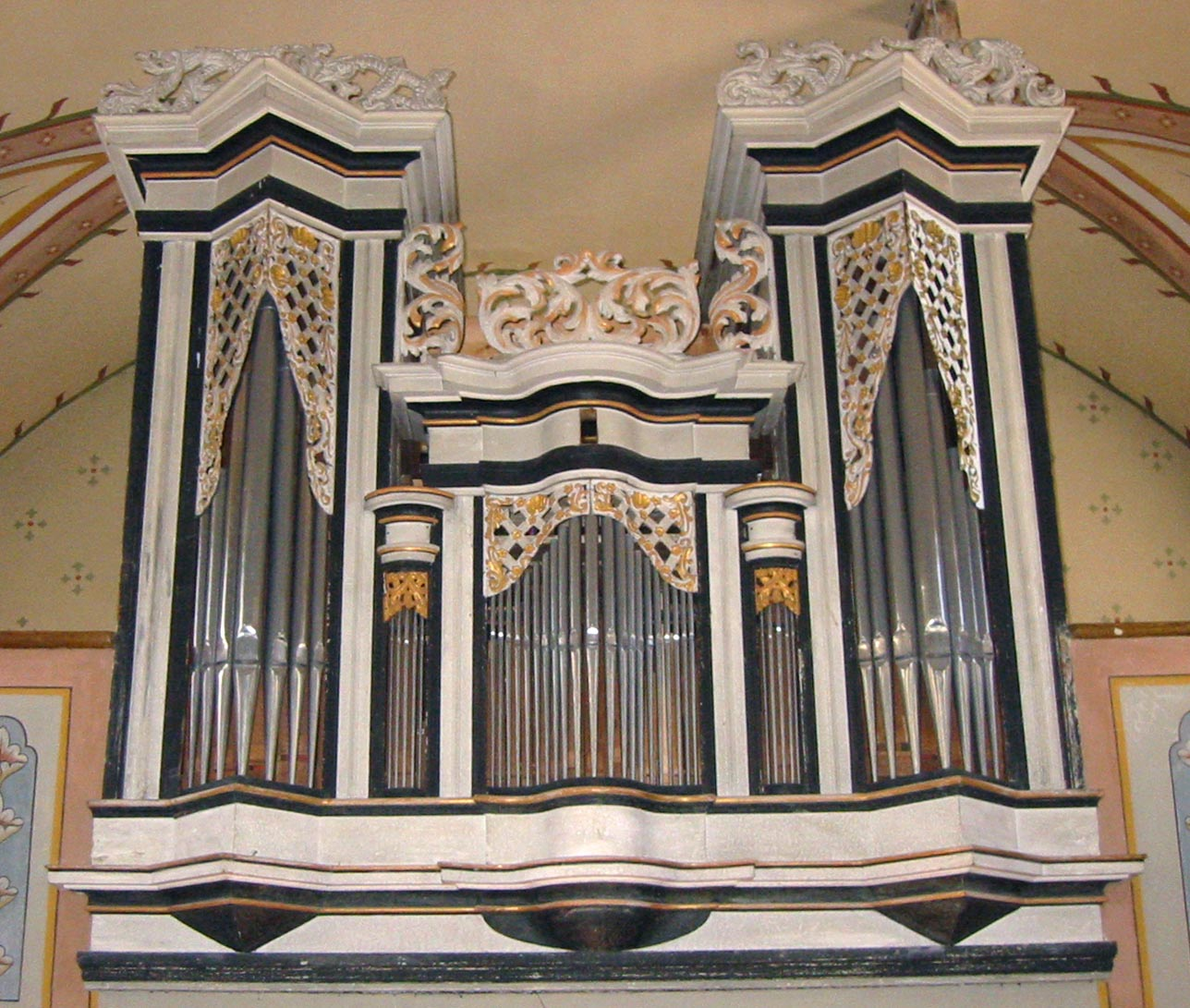 Prospekt der Barockorgel in Boden, Gemeinde Pfafflar, um 1720